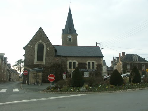 Église de La Meignanne du XIXe siècle, reconstruite en 1809 après avoir été incendiée par les Chouans